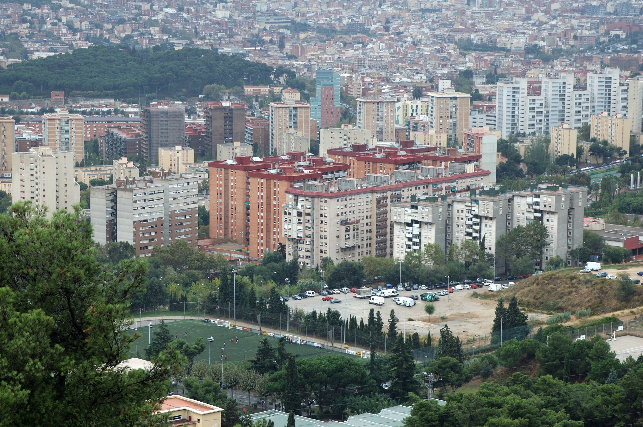 Imatge aèrea del barri de Canyelles, a Barcelona.